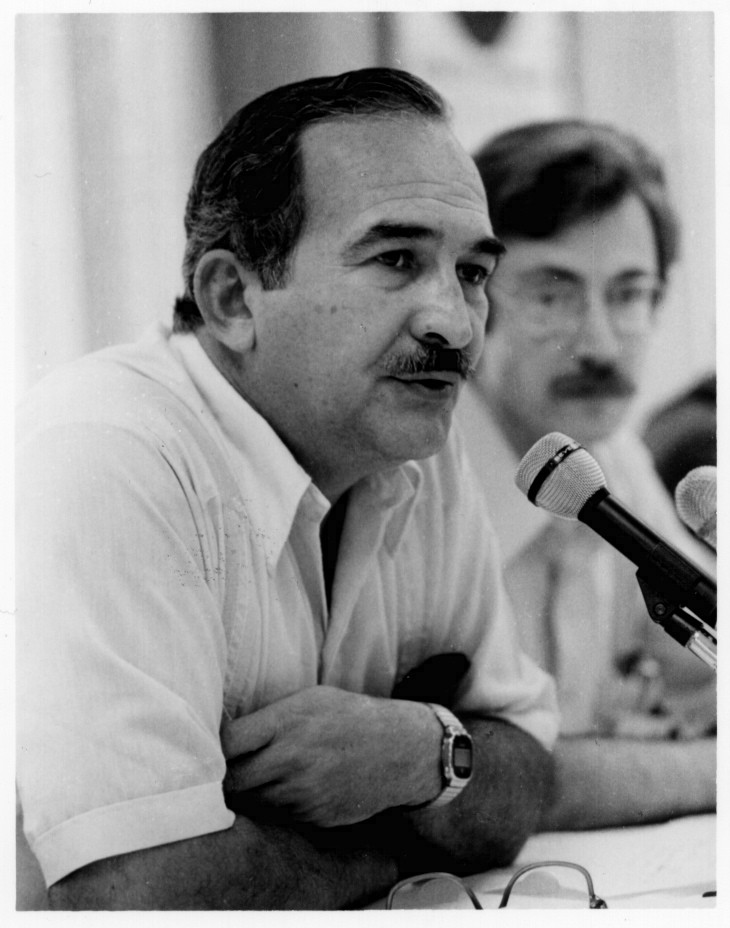 Enrique Álvarez Córdova